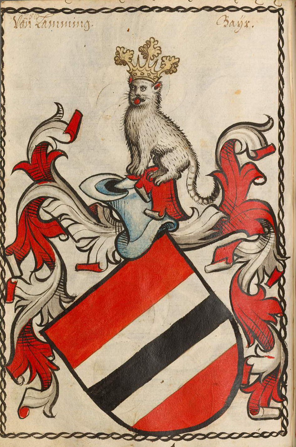 Scheibler'sches Wappenbuch , älterer Teil Wappen der Familie Laiming. Bayern Seite 258